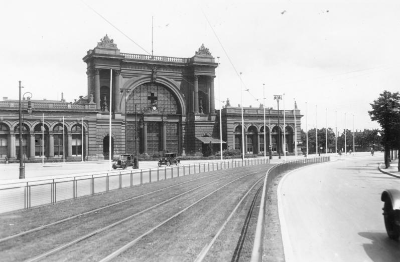 Berlin, Lehrter Bahnhof Scherl: Erst Vorbereitungen zum Empfang des Königs Fuad. Der Lehrter Bahnhof umgeben von Fahnenstangen. 18175-29 [Berlin 1929]